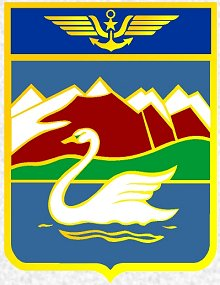 Blason de Escadrille 3S Marine francaise, Aéronautique Navale